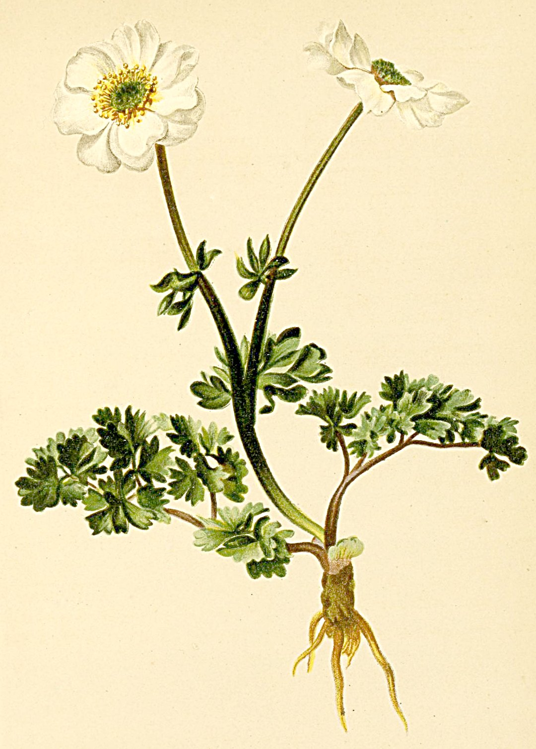 Ranunculus rutaefolius